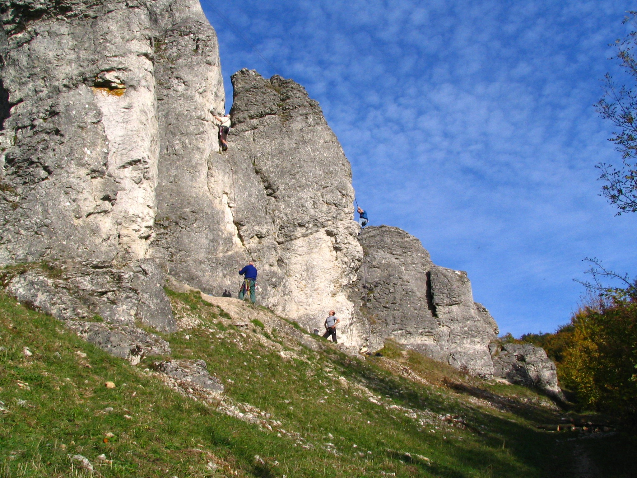 Climbing at Eulenwand, nearby Tiefenellern, Fränkische Schweiz / Franconian Switzerland, Franken / Franconia, Bayern / Bavaria, Deutschland / Germany.